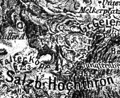 Ausschnitt aus der Special-Karte der Berchtesgadener Alpen Blatt II Berchtesgaden aus Zeitschrift des Deutschen und Oesterreichischen Alpenvereins 1886 Band 17 zur Veranschaulichung der Felszeichnung